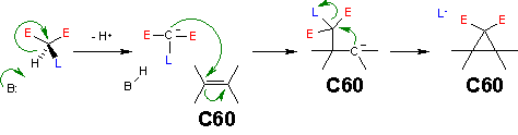 Mecanismo de reacción de Bingel